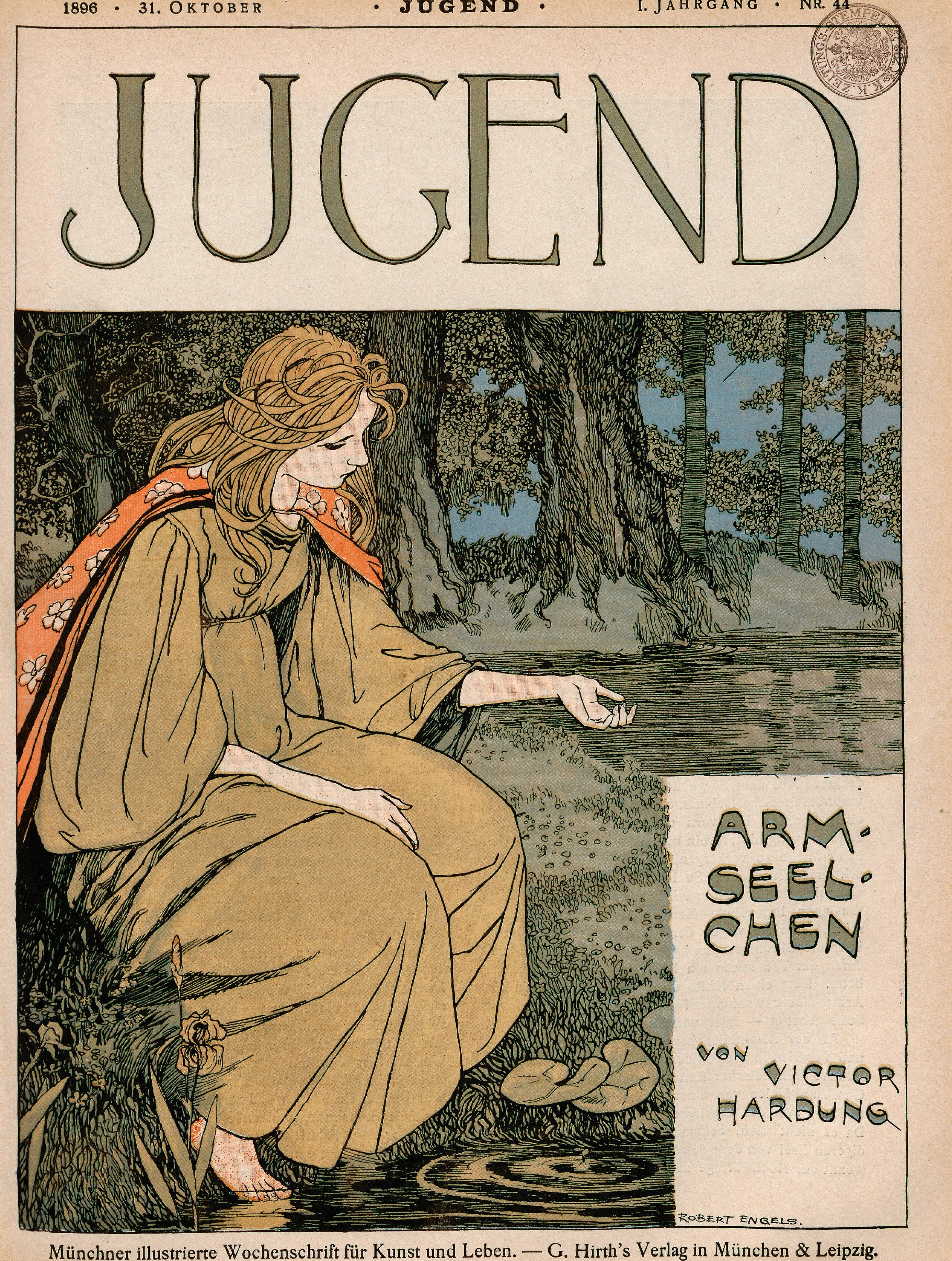 Robert Engels - Umschlag der Kunst- und Literaturzeitschrift "Jugend", Ausgabe Nr. 44/1896.